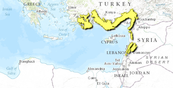 Mappa Ecoregione PA1220 - Foreste di conifere e decidue dell'Anatolia meridionale